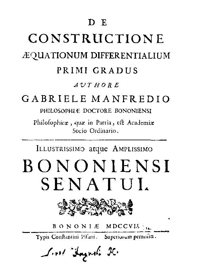 De constructione aequationum differentialium primi gradus authore Gabriele Manfredio ... Illustrissimo atque amplissimo Bononiensi Senatui. - Bononiae : typis Constantini Pisarii, 1707. - 204 p., [7] c. di tav. ripiegate : ill. calcografiche ; 4º .